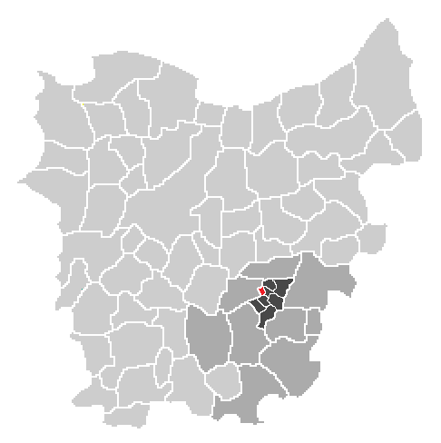 Oost-Vlaanderen uitgeknipt en bewerkt